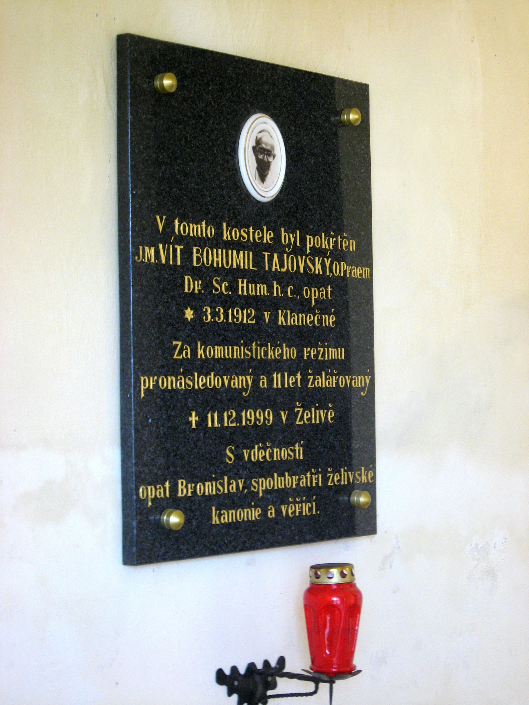 Krásná Hora, pamětní deska